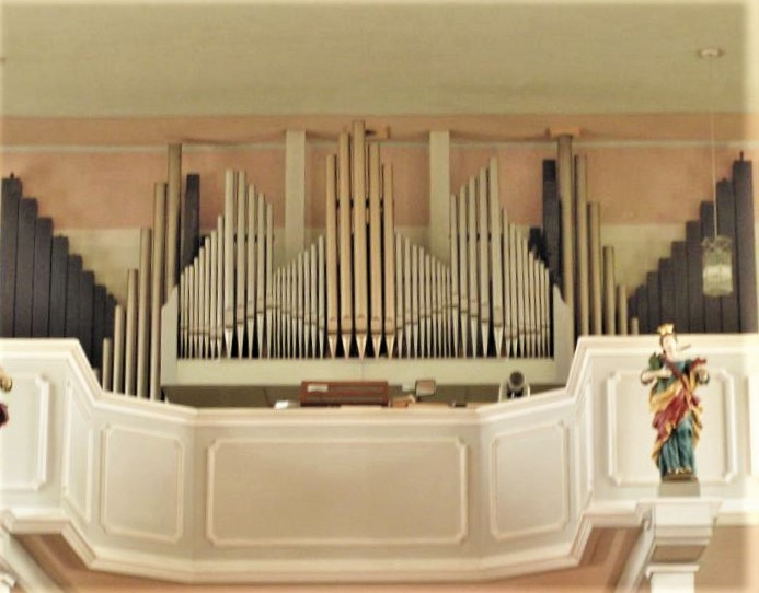 Orgel der Kirche St Albaunus Schillingen